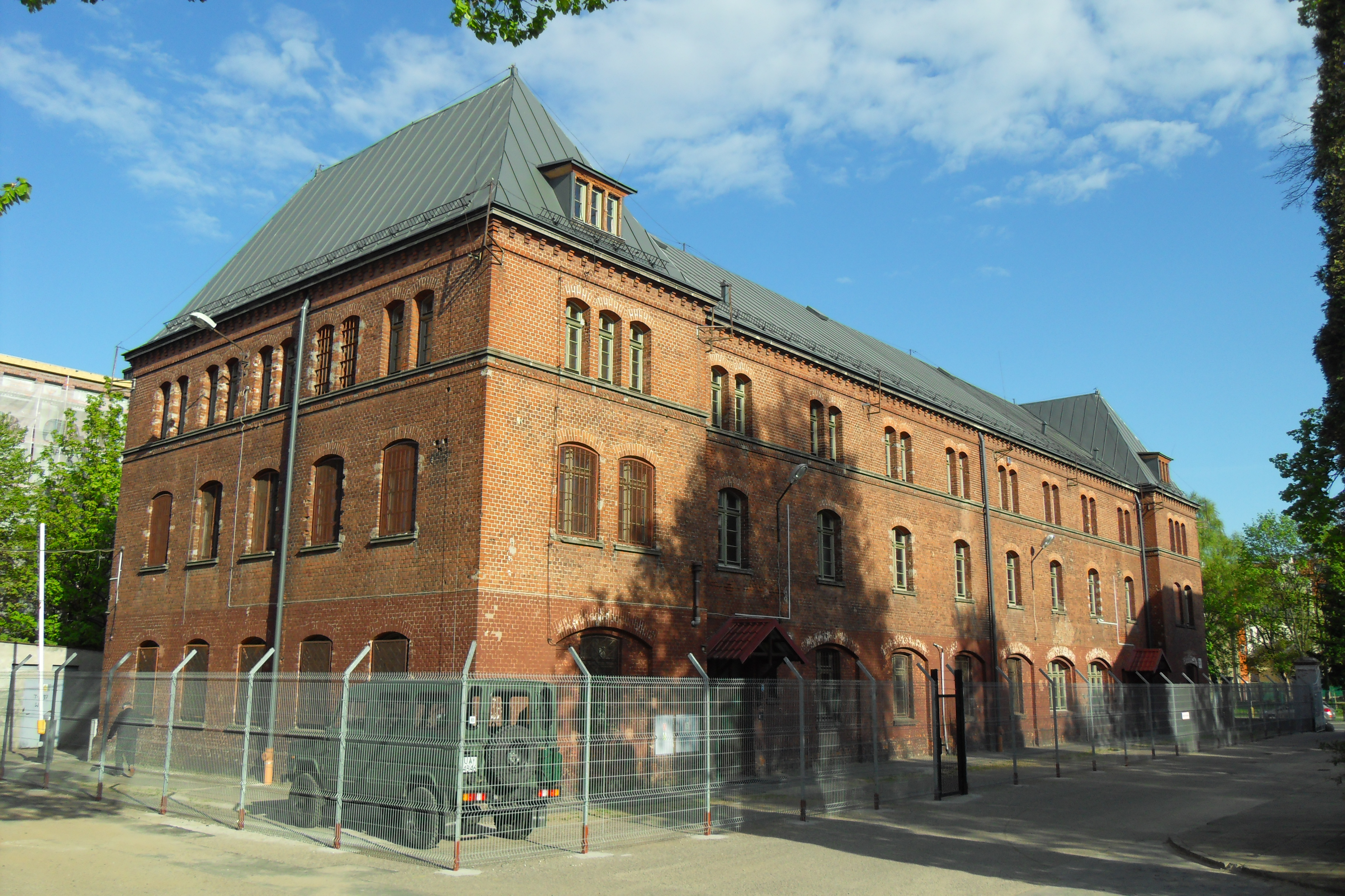 Gdańsk Wrzeszcz Górny, ul. Słowackiego 5. Dawne koszary.